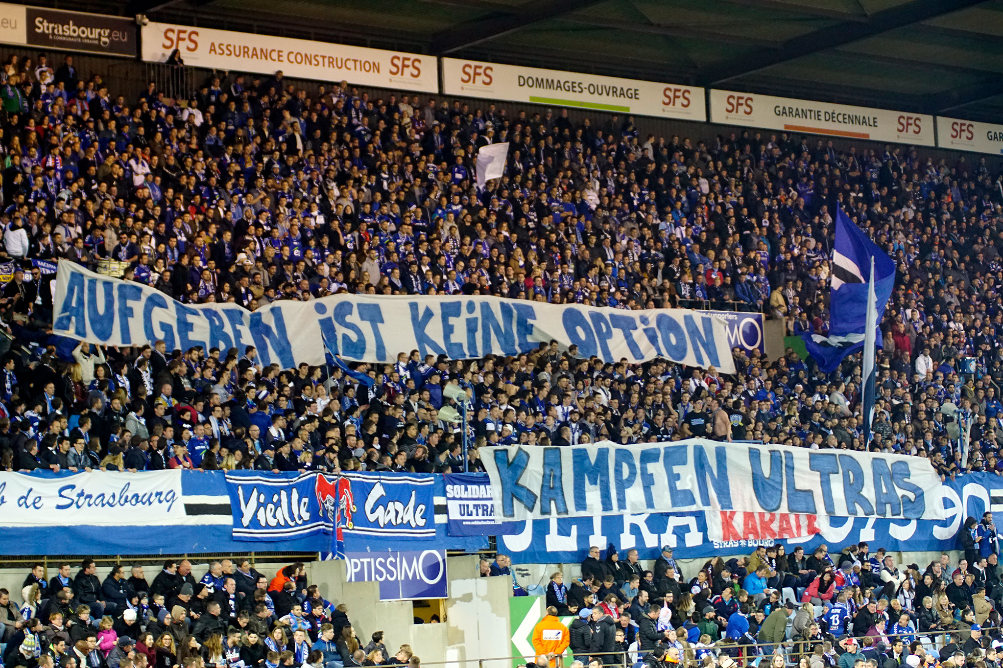 Choreographie beim Spiel Racing Club de Strasbourg gegen AC Ajaccio in der zweiten französischen Liga am 17. April 2017 im Stade de la Meinau. Das Banner ermutigt die befreundeten Ultras des Karlsruher Sportclubs, der sich zu dieser Zeit tief im Abstiegskampf der zweiten Bundesliga befindet und am Ende der Saison absteigen wird.